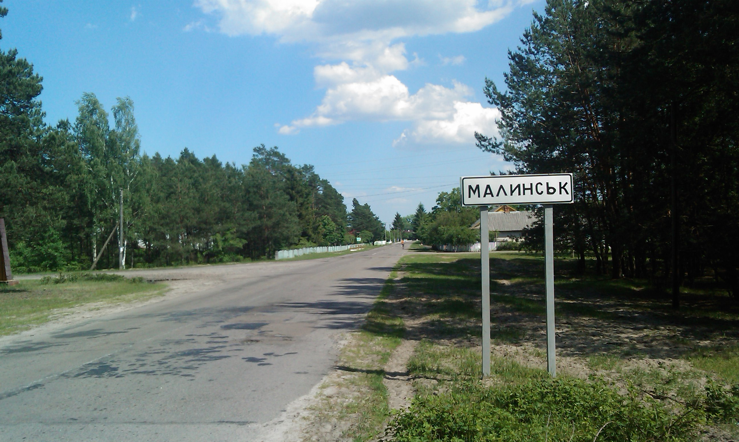 Малинськ, Рівненська область, Україна — в'їзд зі сторони Степані